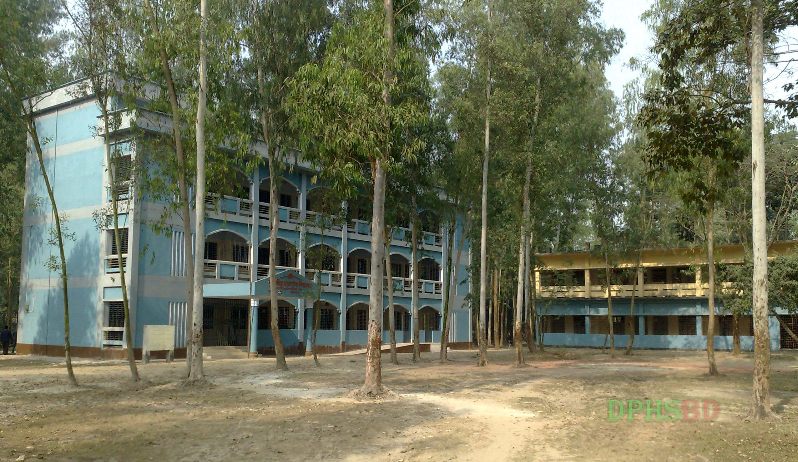 দুপচাঁচিয়া মডেল উচ্চ বিদ্যালয়ের ভবন সমূহ